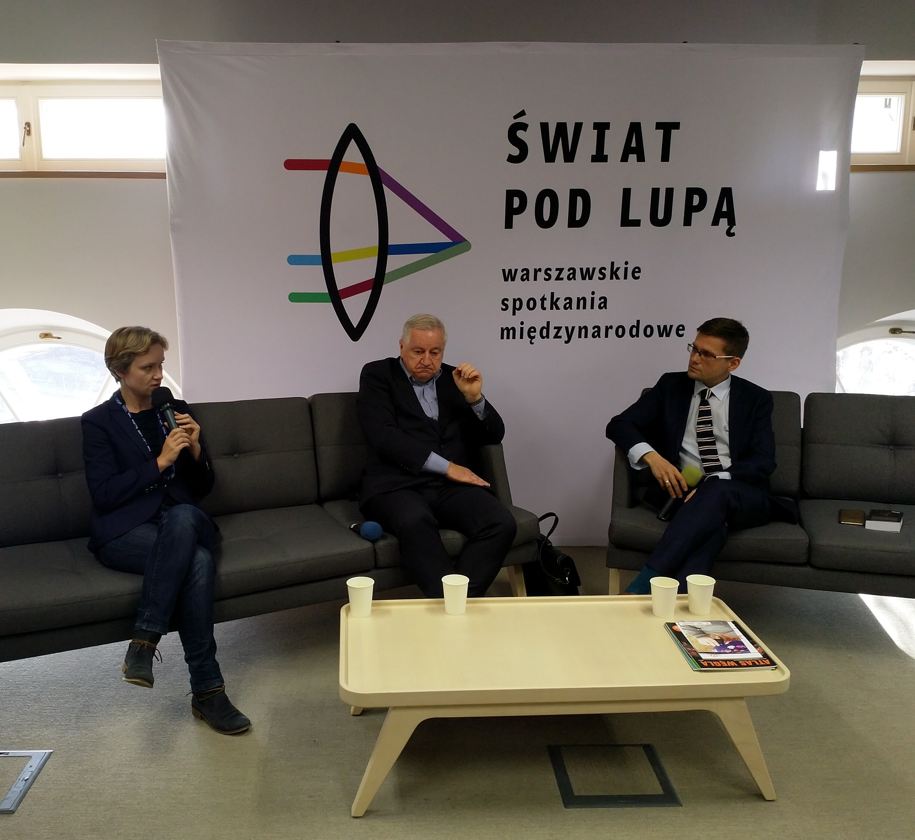 Katarzyna Golik, Bogdan Góralczyk, Rafał Tomański podczas panelu "Jak Chiny zmieniają porządek świata" w ramach debat "Świat pod lupą".